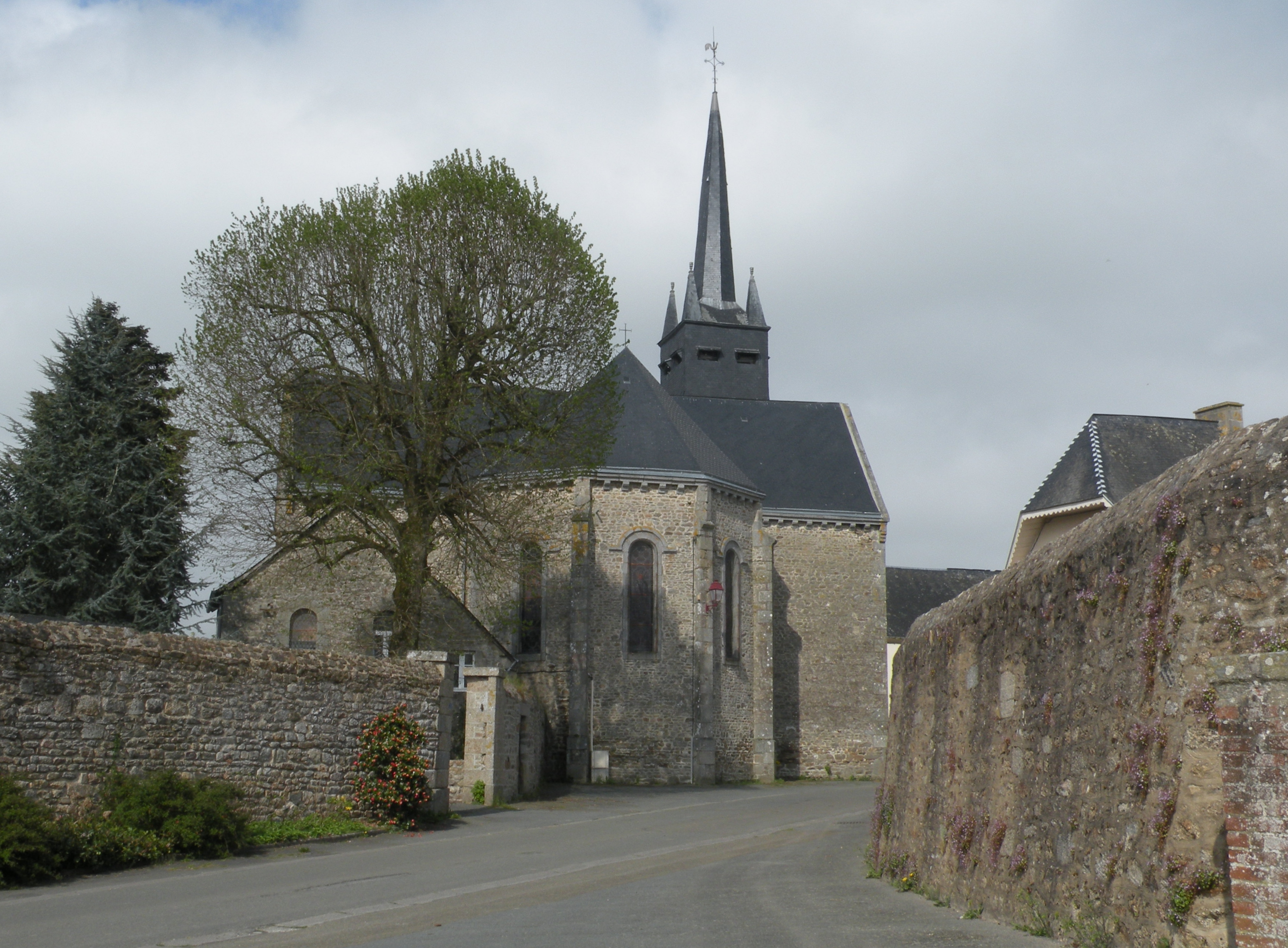 Église Saint-Martin de Marcillé-la-ville